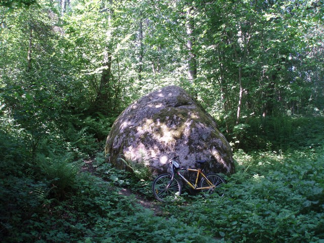 Īvānu Velnakmens, 2007.